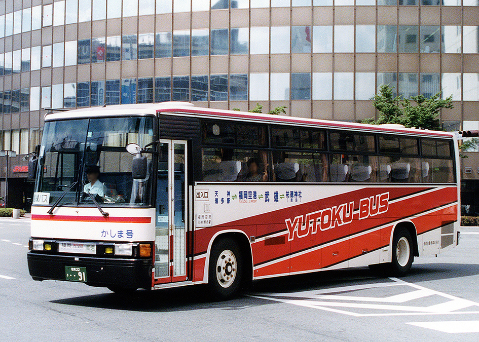 祐徳自動車 かしま号 日野・ブルーリボン P-RU638BB